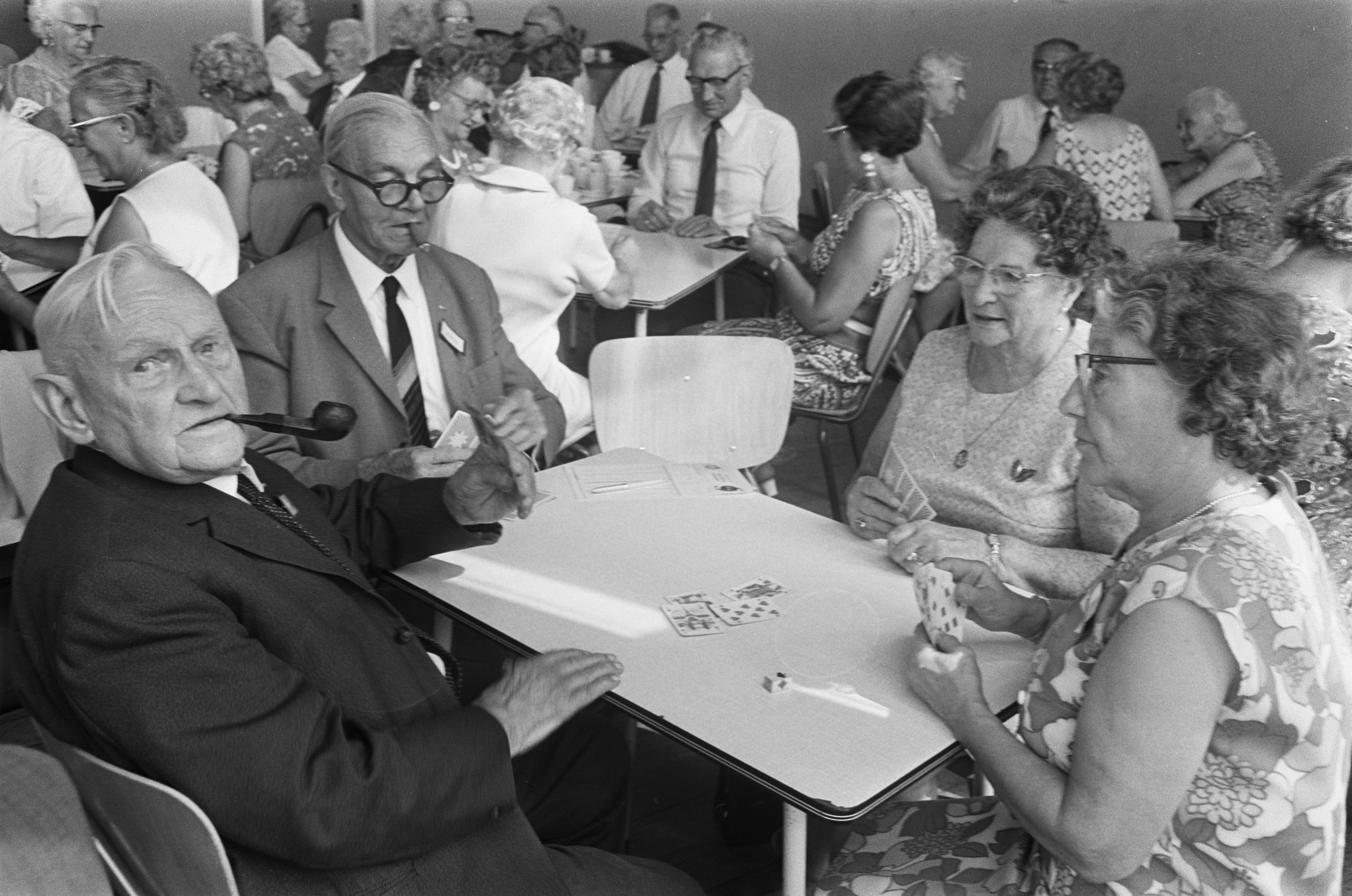 Collectie / Archief : Fotocollectie Anefo Reportage / Serie : [ onbekend ] Beschrijving : Opdracht HP: UVV-bejaardensocieteit in gebouw Reigersburg Amsterdam-Oost; bejaarden kaarten Datum : 25 augustus 1970 Locatie : Amsterdam, Noord-Holland Trefwoorden : BEJAARDEN, KAARTEN Fotograaf : Koch, Eric / Anefo Auteursrechthebbende : Nationaal Archief Materiaalsoort : Negatief (zwart/wit) Nummer archiefinventaris : bekijk toegang 2.24.01.05 Bestanddeelnummer : 923-7802